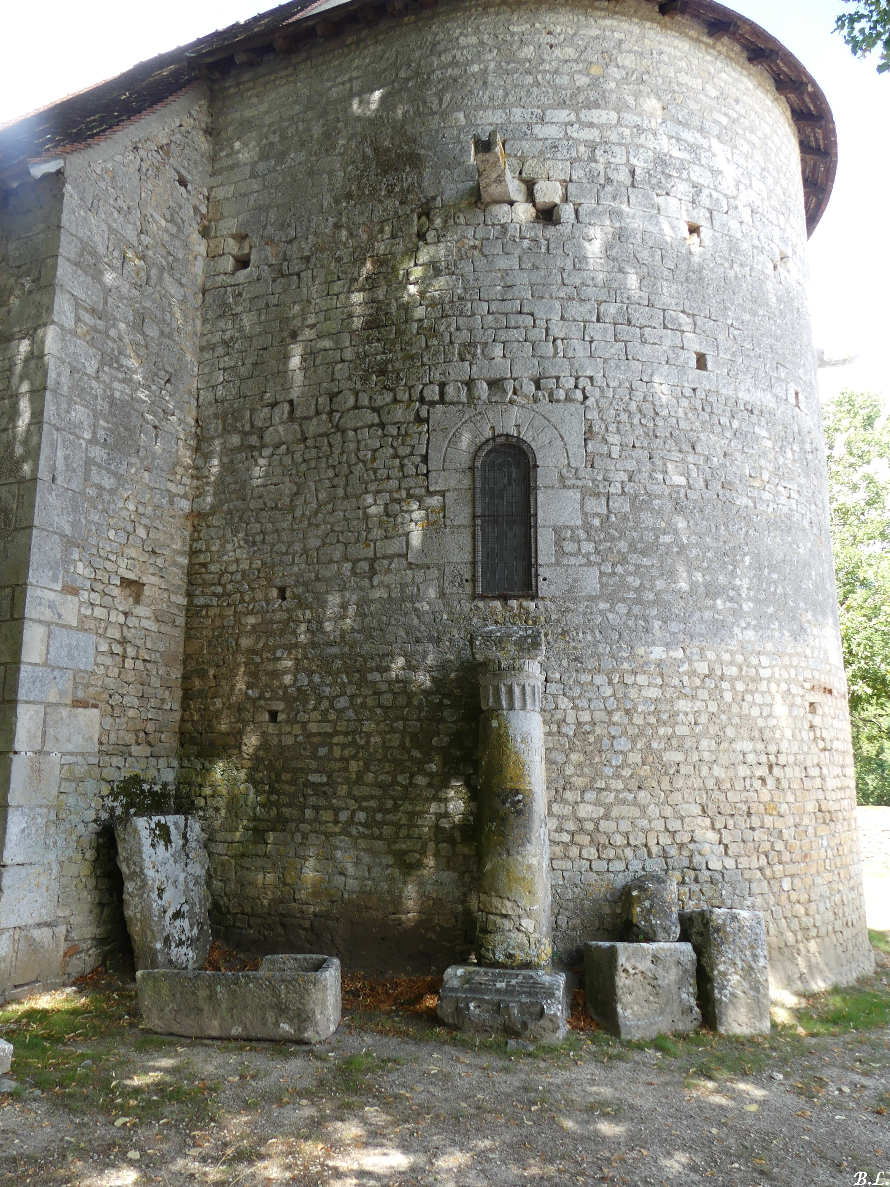 abside carolingienne et borne miliaire